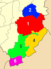 Χάρτης των ενοτήτων (και πρώην δήμων) από τις οποίες αποτελείται ο Δήμος Σοφάδων